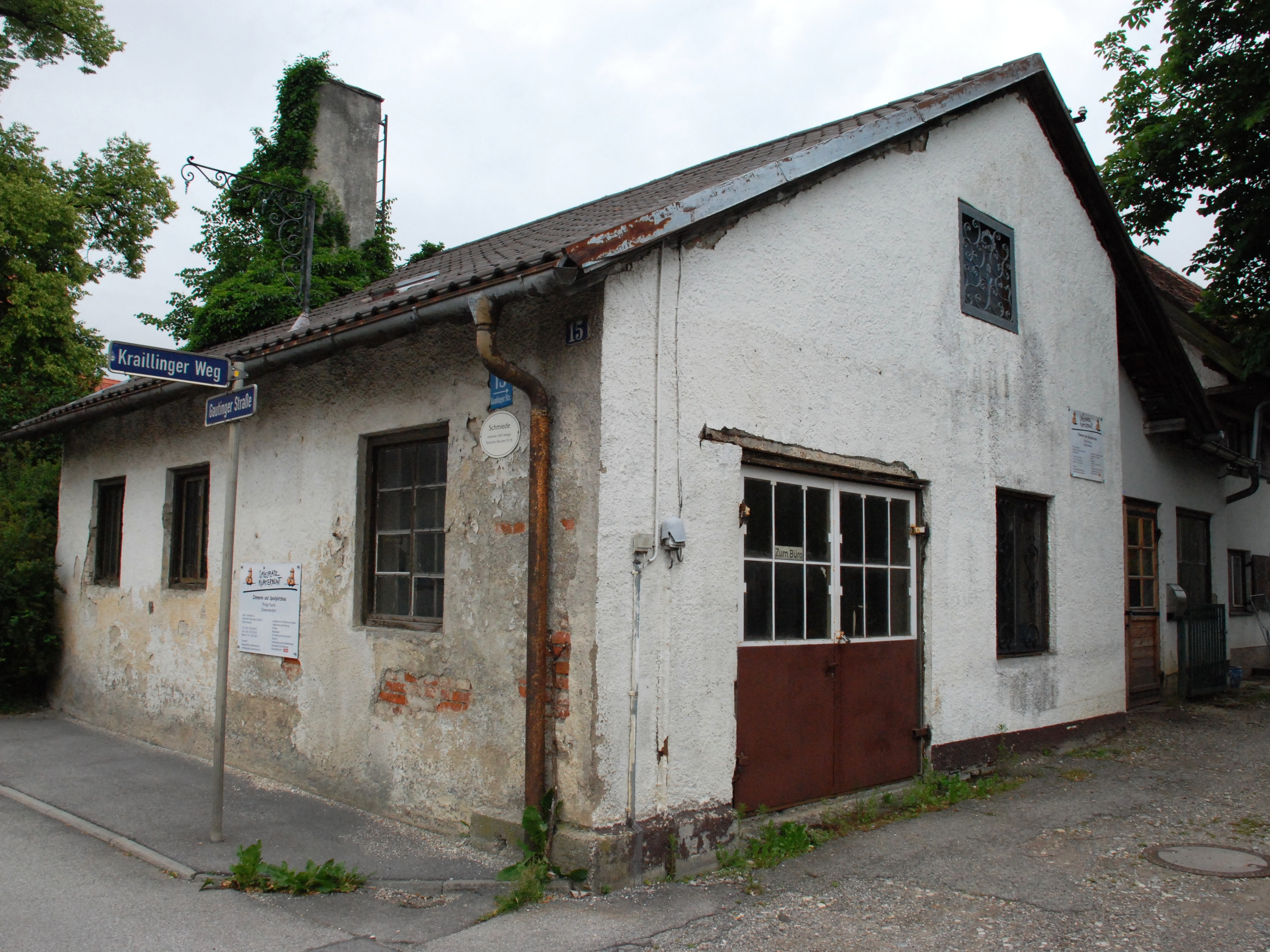 Ehemalige Dorfschmiede, Hausname „Beim Schmied“, in der Gautinger Straße15 in der Gemeinde Neuried, Landkreis München, Bezirk Oberbayern, Bayern. Erbaut 1860. Als Baudenkmal unter Aktennummer D-1-84-132-4 in der Bayerischen Denkmalliste aufgeführt. Foto gemäß den Voraussetzungen zur Panoramafreiheit von öffentlichem Verkehrsgrund aus aufgenommen.